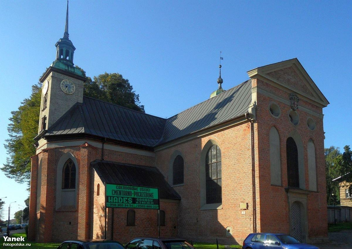 Kościół pw Bożego Ciała, od strony ulicy 3 Maja.